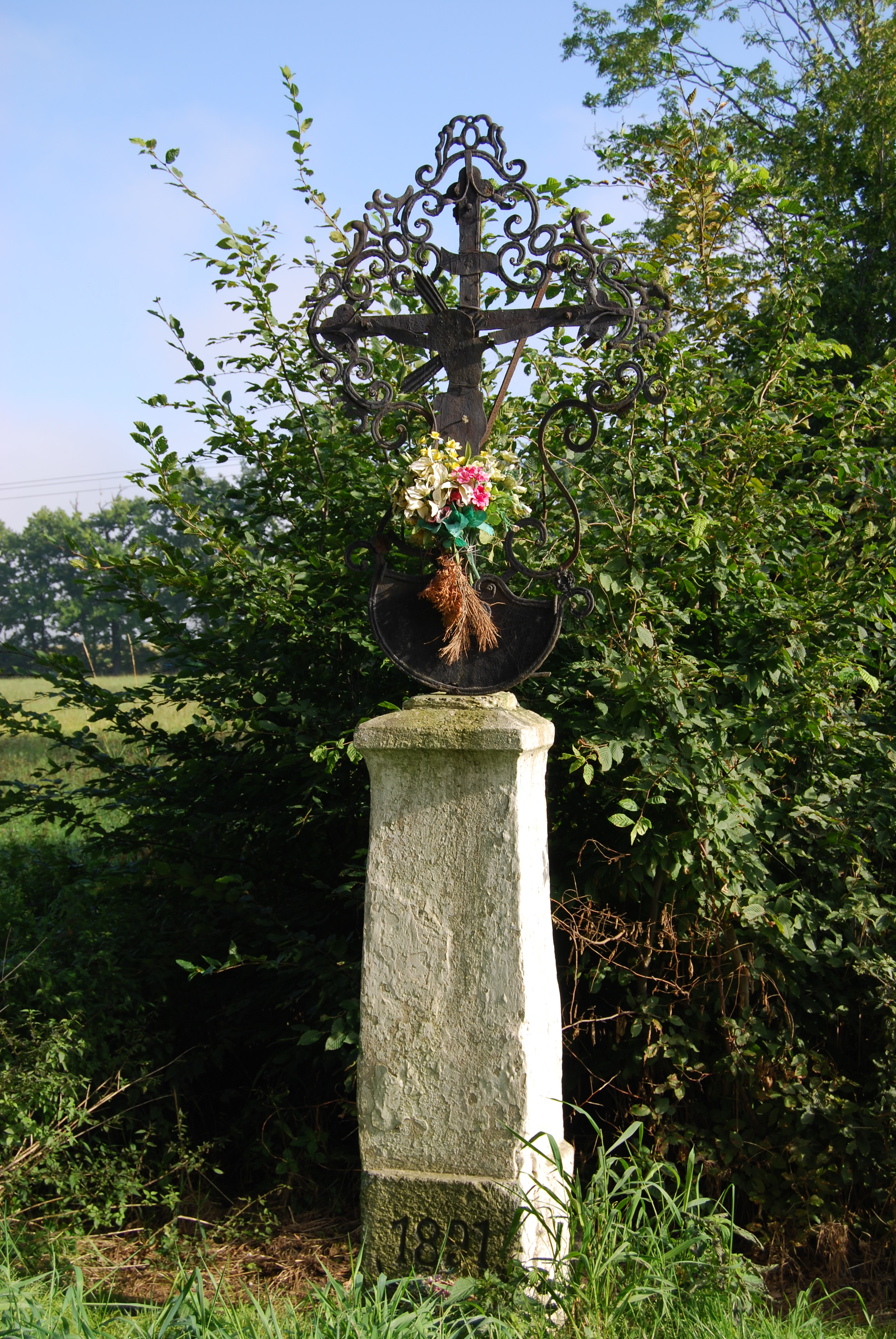 Kříž poblíž obce Bzí. Bzí je část obce Letiny v okrese Plzeň-jih. Česká republika.